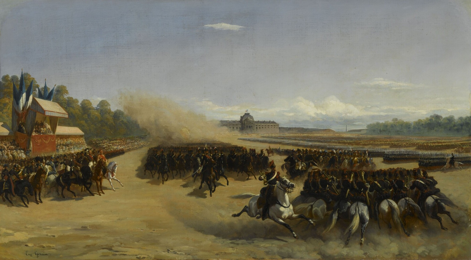 Revue passée au Champ-de-Mars en l'honneur d'Ibrahim Pacha, 25 mai 1846. Dimensions : 81 x 147,5 cm cadre: 116,5 x 180 x 10 cm. Matière et technique : huile sur toile.